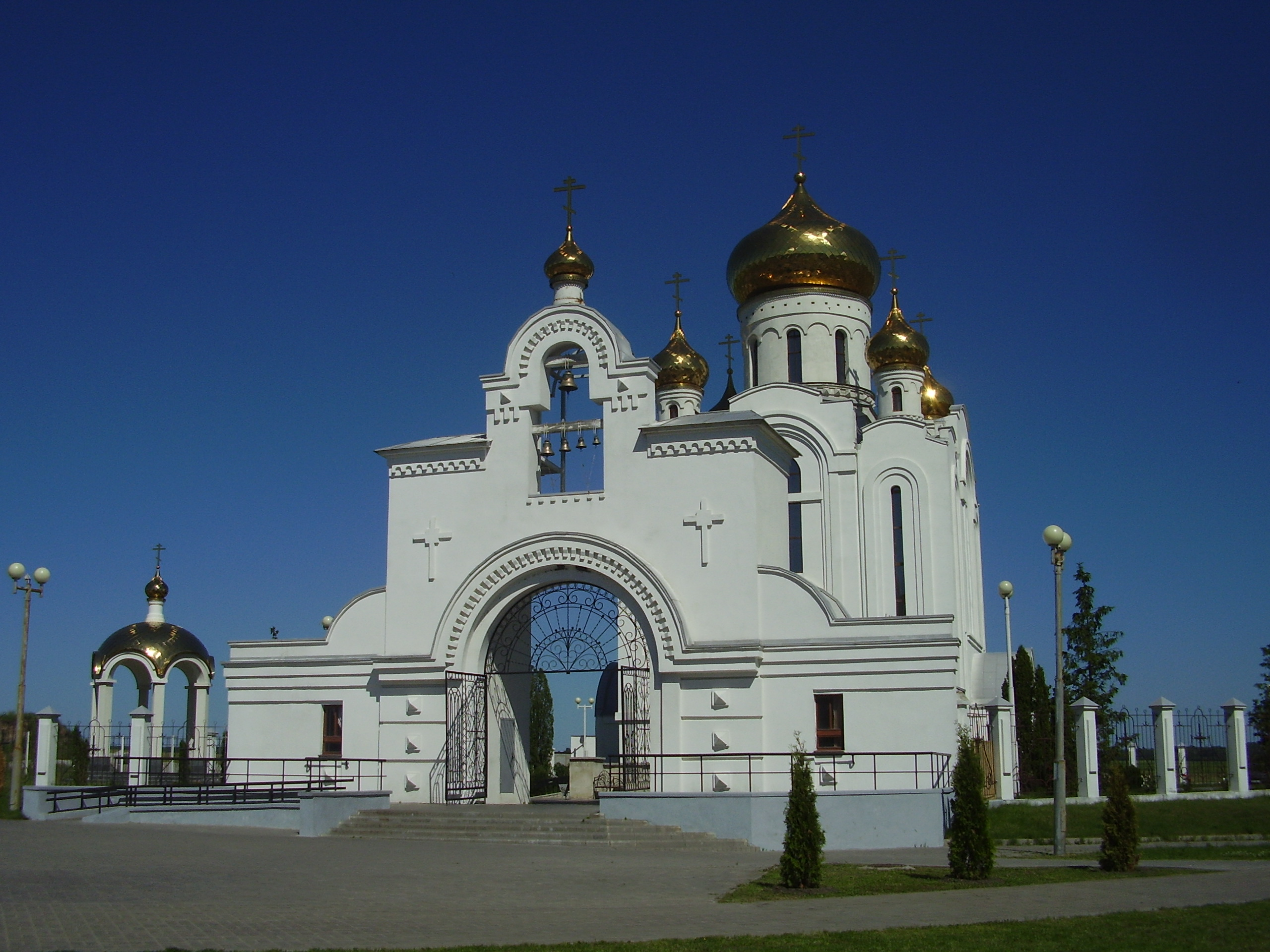 Старый Оскол. Церковь Рождества Христова